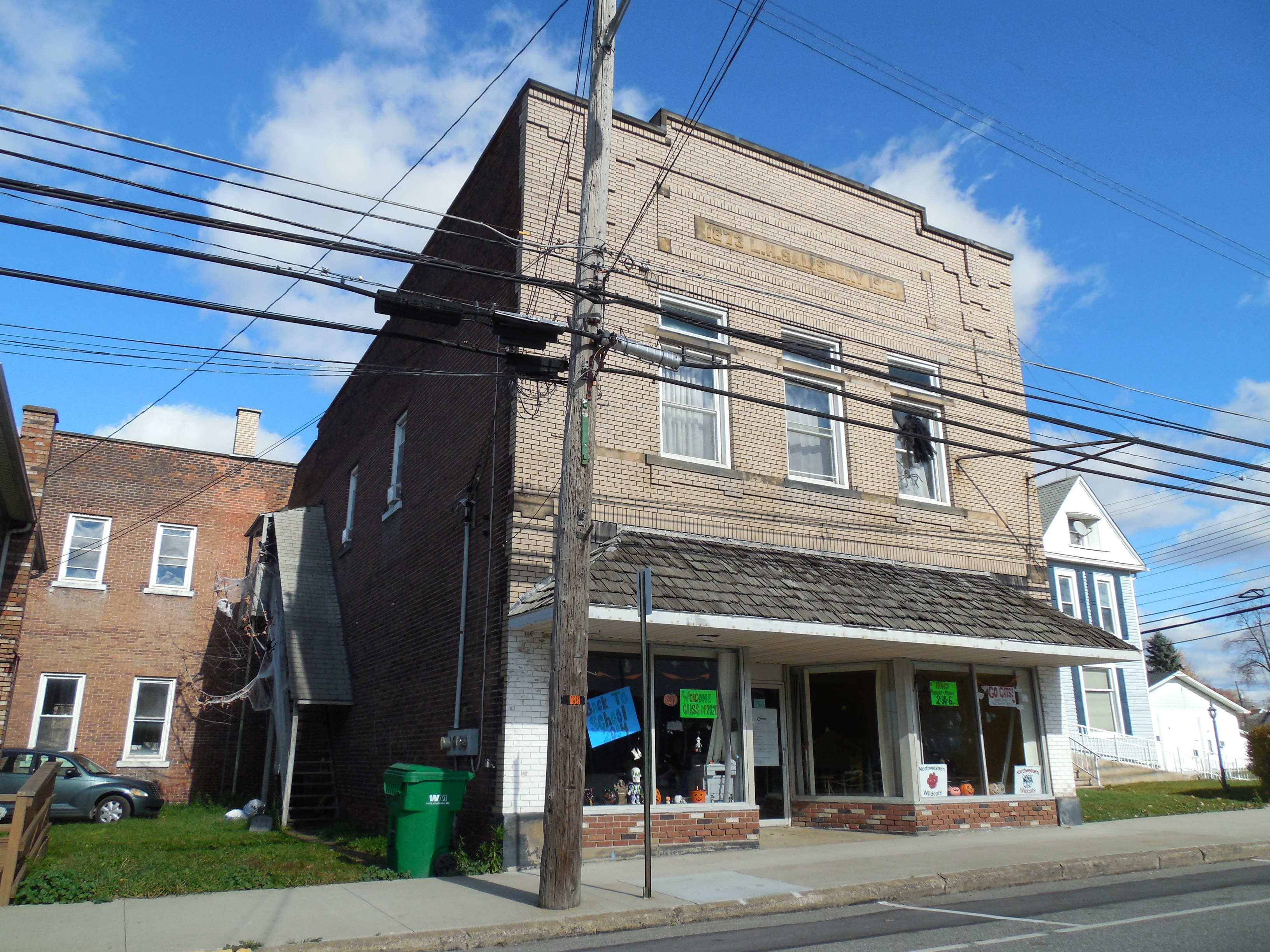 Albion, Pennsylvania